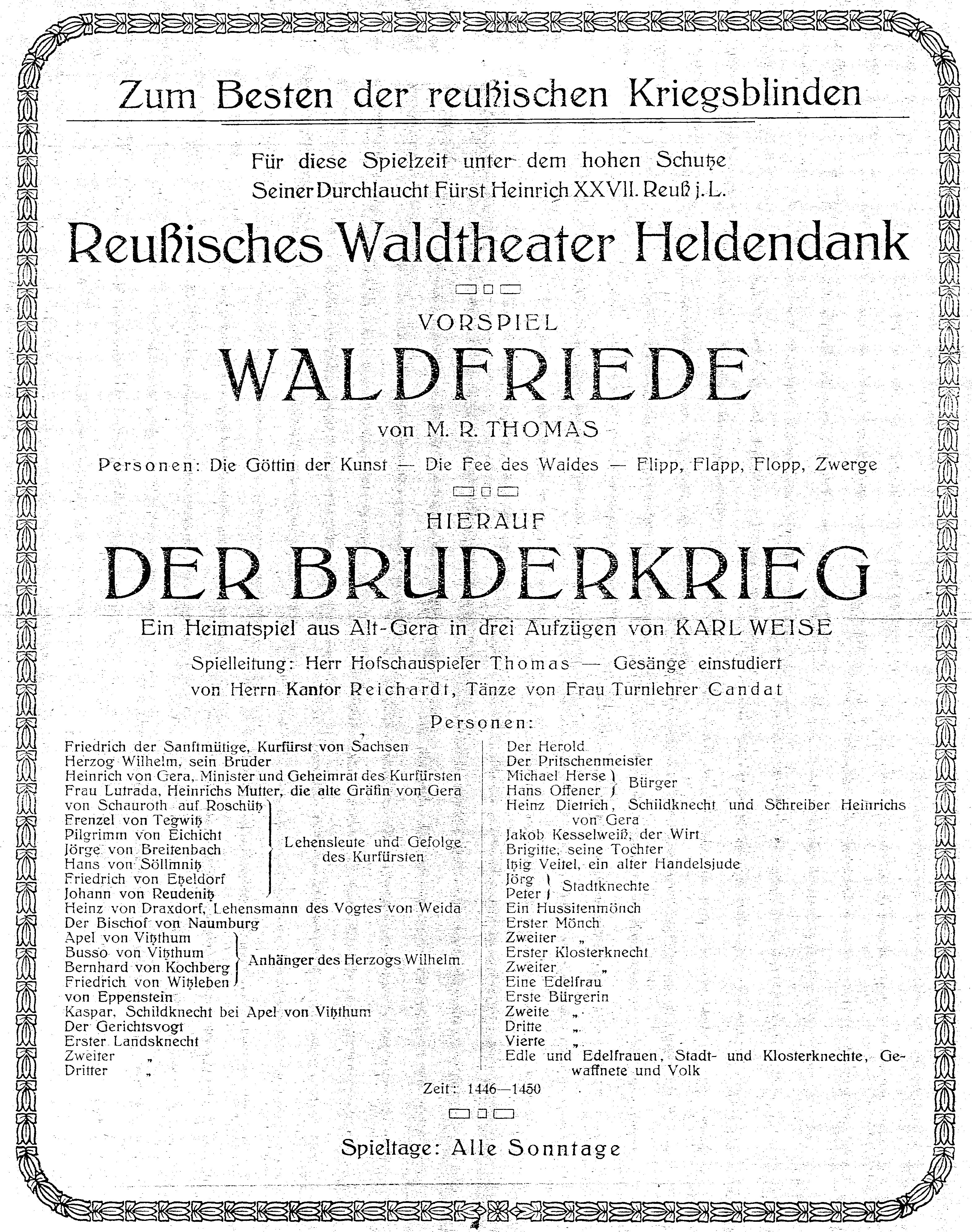 Erster Programmzettel des Reußischen Waldtheaters "Heldendank"